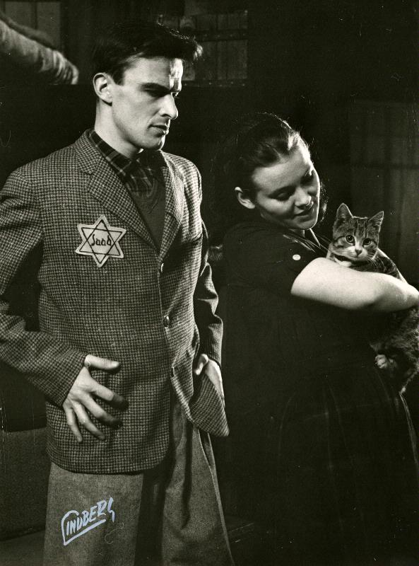 Arne Strand och Nadja Witzansky i Anne Franks dagbok på Helsingborgs stadsteater.